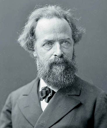 Élisée Reclus, né à Sainte-Foy-la-Grande (Gironde) le 15 mars 1830 et mort à Torhout en Belgique le 4 juillet 1905, est un géographe libertaire.